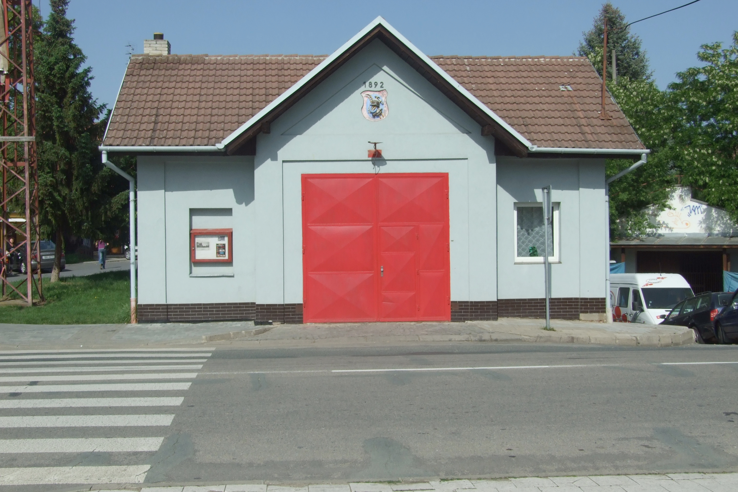 Brno-Chrlice - požární zbrojnice